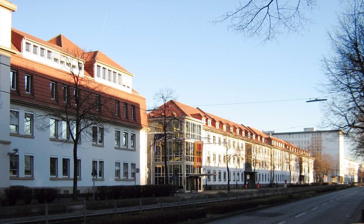 Bonner Dienstsitz des Bundesministeriums des Innern, ehemalige Düppel-Kaserne, Graurheindorfer Straße